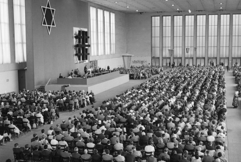 21.7.1961 West-Berlin 10. evangelischer Kirchentag, 61. Arbeitsgruppe "Juden und Christen" in der Messehalle am Funkturm